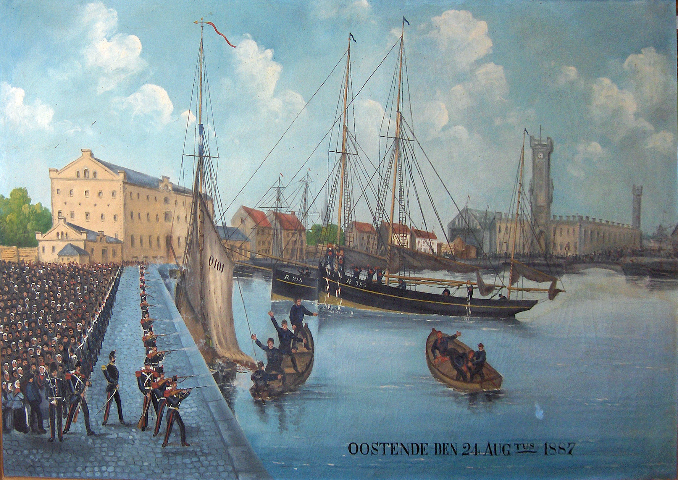 "Visserijopstand, Oostende 24 augustus 1887", anoniem historisch schilderij, olieverf op doek, 85 x 137 cm; 19de eeuw; privé-bezit